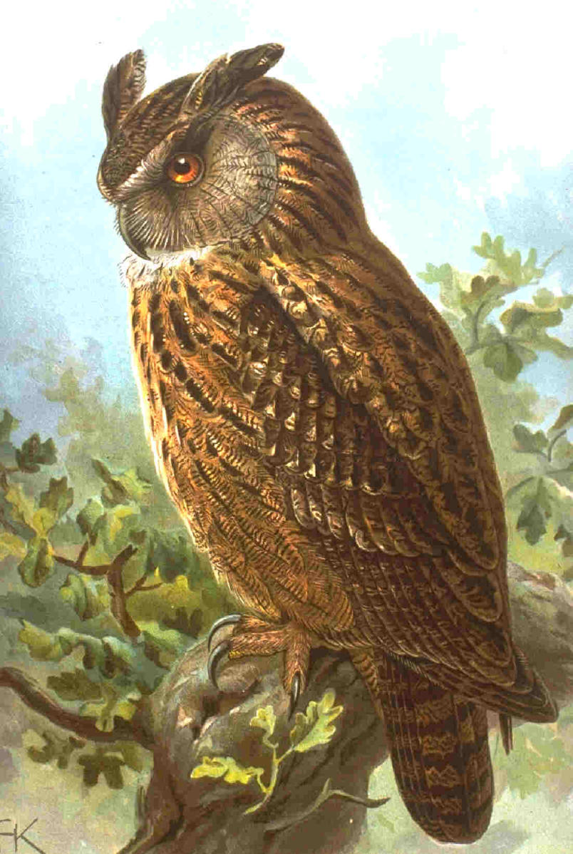 Bubo bubo (Eagle Owl) drawing by Naumann